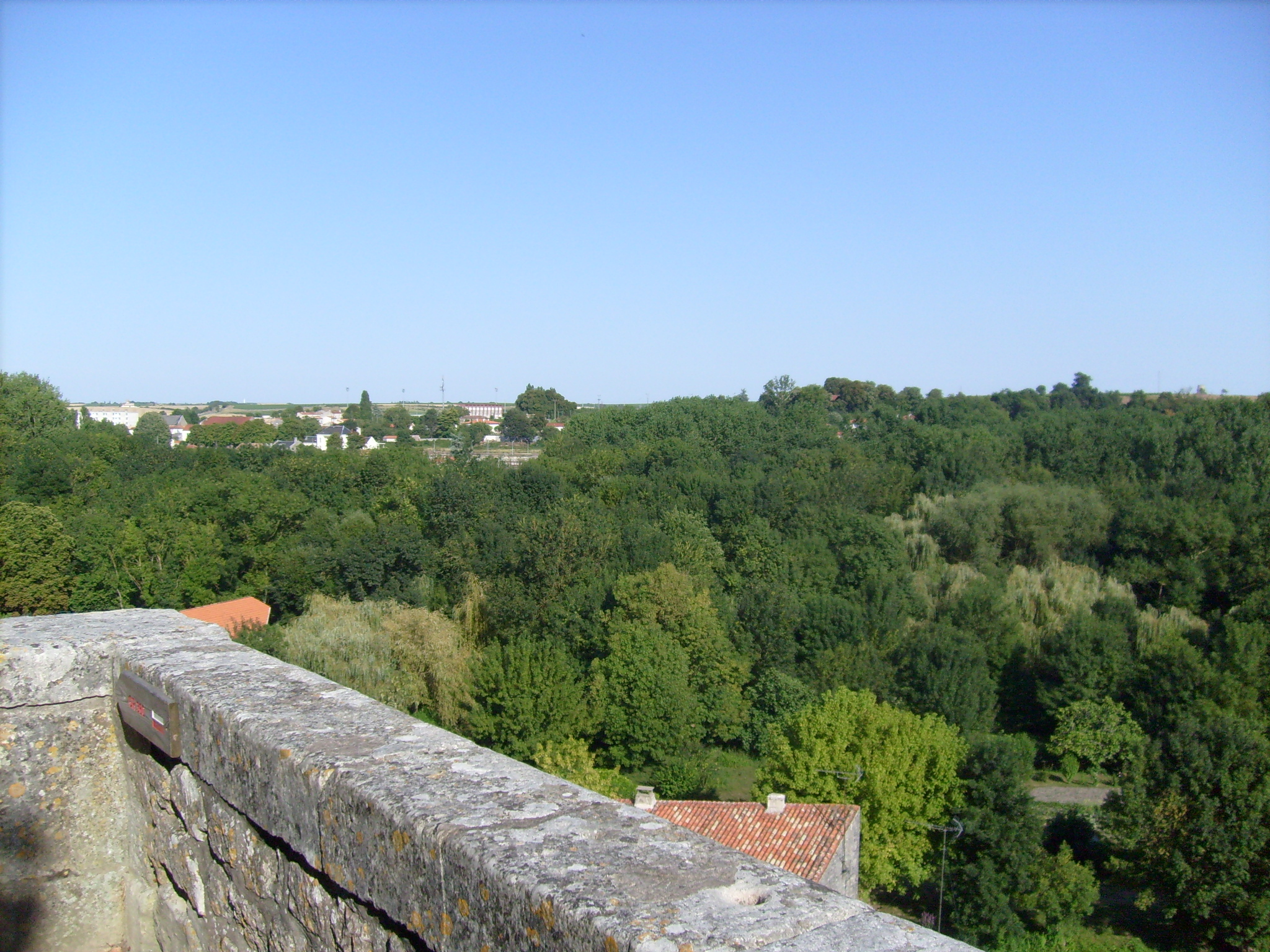 Paysage depuis les remparts de Pons